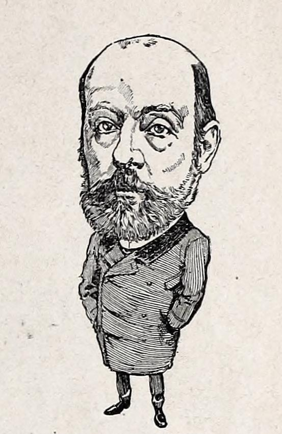 Los hombres del día. Nuestros críticos.